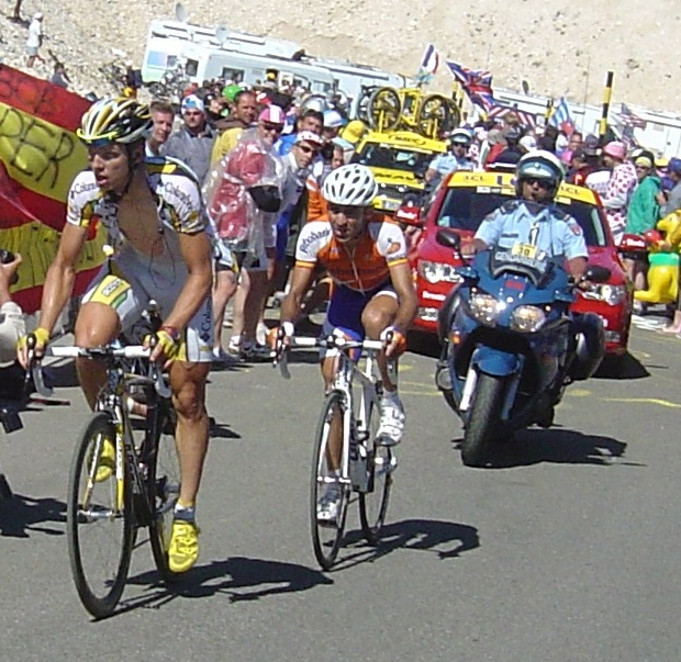 Tony Martin et Juan-Manuel Garate en tête de la 20e étape du Tour de France 2009